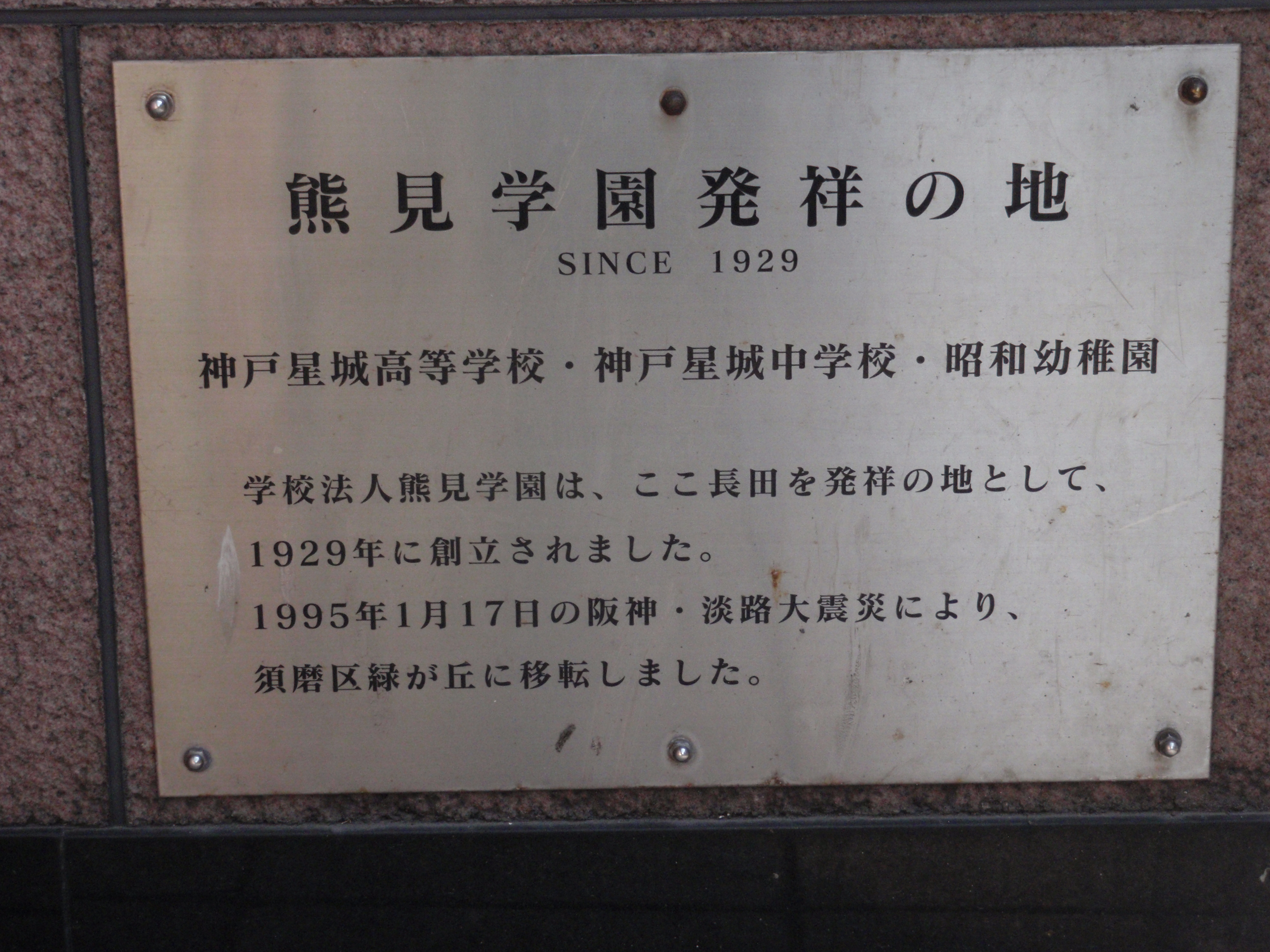 熊見学園発祥の地の看板